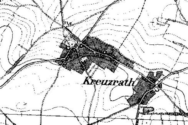 Neuaufnahme 1891-1912